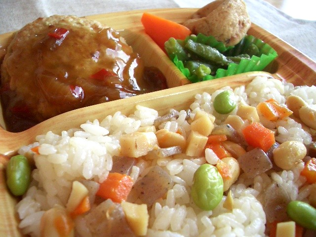 豆腐ハンバーグとお豆ごはんのヘルシー弁当：）lunch box / お弁当